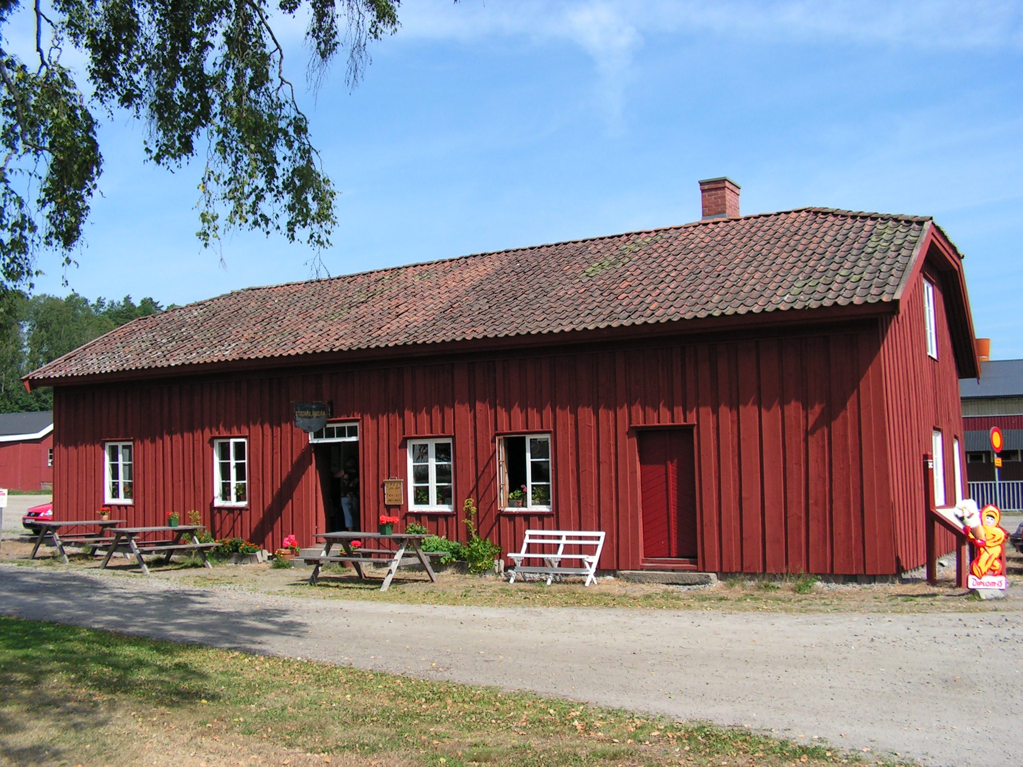 Statarlänga vid Blomsholm, Norr om Strömstad.